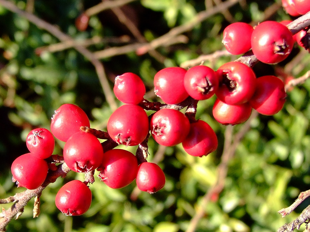 Crataegus monogyna (fruits)